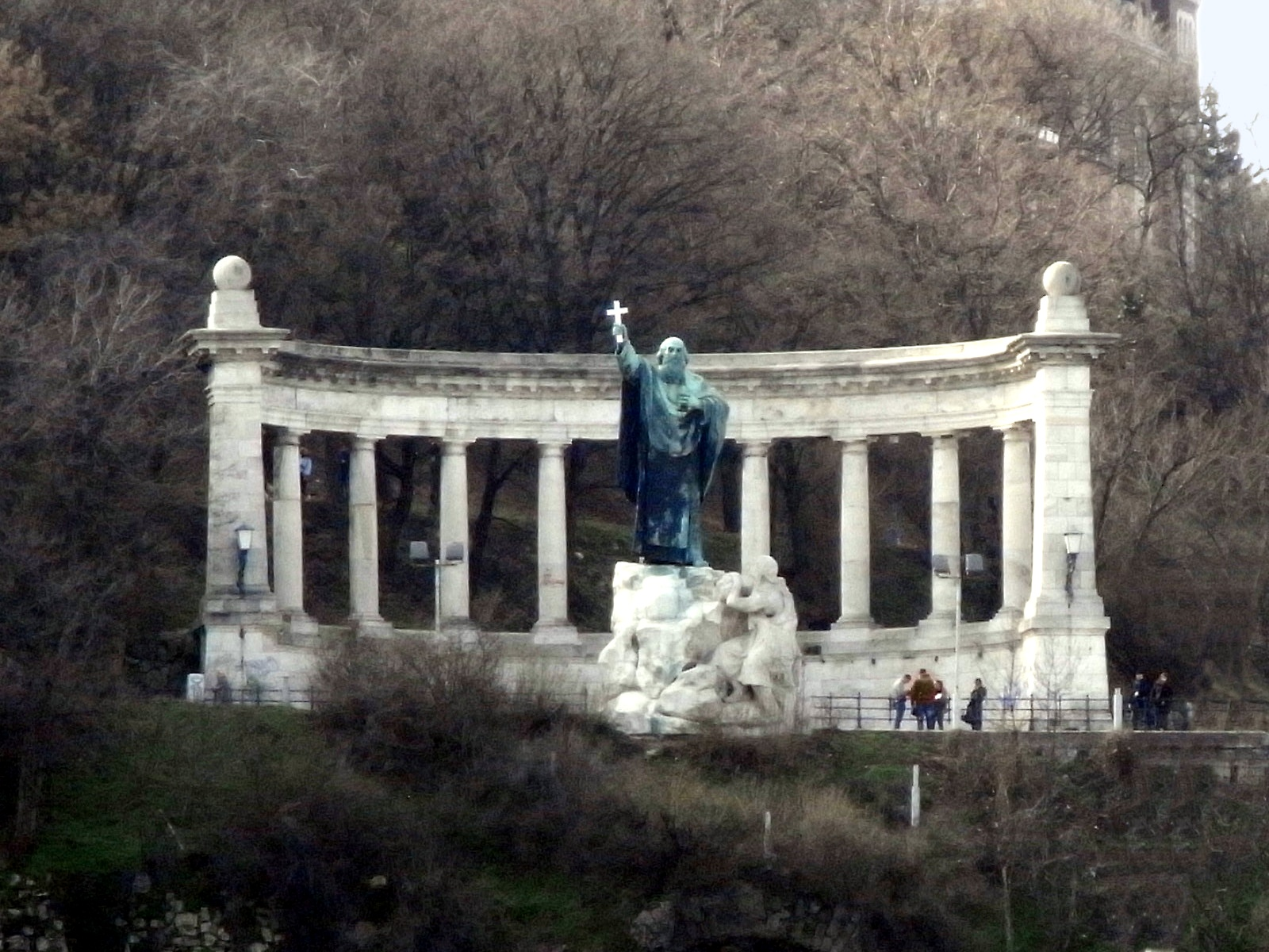 Statue von Gerhard Sagredo am Gellért-Berg in Budapest, aufgenommen vom Pester Donauufer.